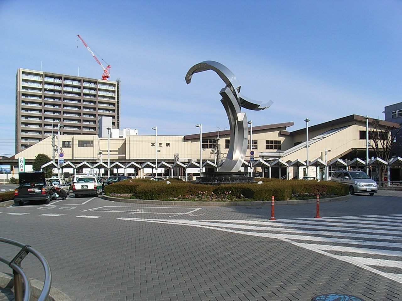 Honjo Station (South Entrance) on JR Takasaki Line.(3-6-19,Ginza,Honjo-shi,Saitama-ken,JAPAN)